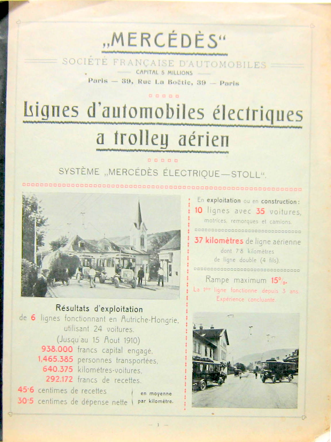 französisches Werbeplakat der Firma Elektro-Daimler-Stoll